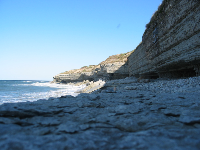 Osmussaar